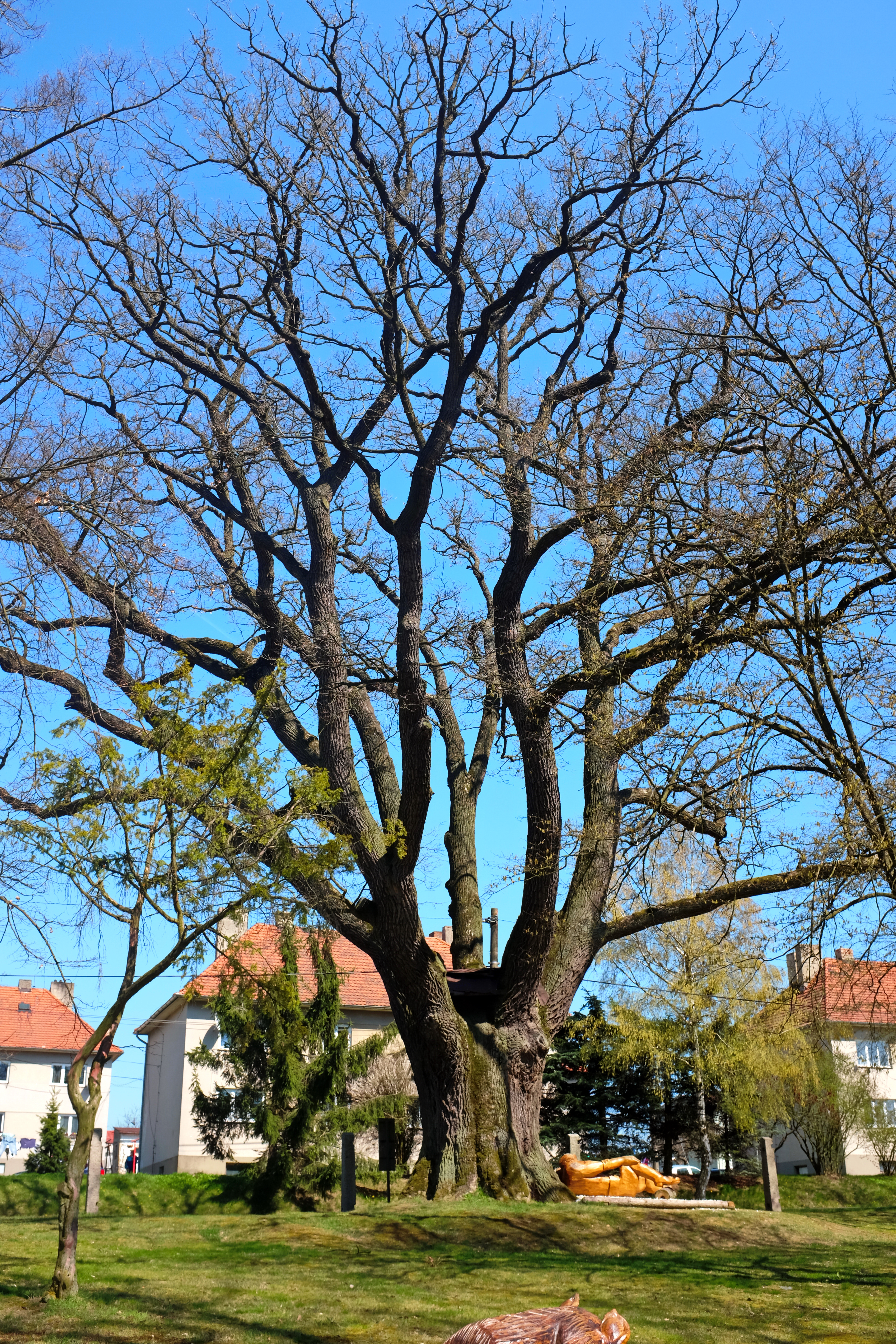 Památný strom - Valdštejnův dub - Okrouhlá, okres Cheb